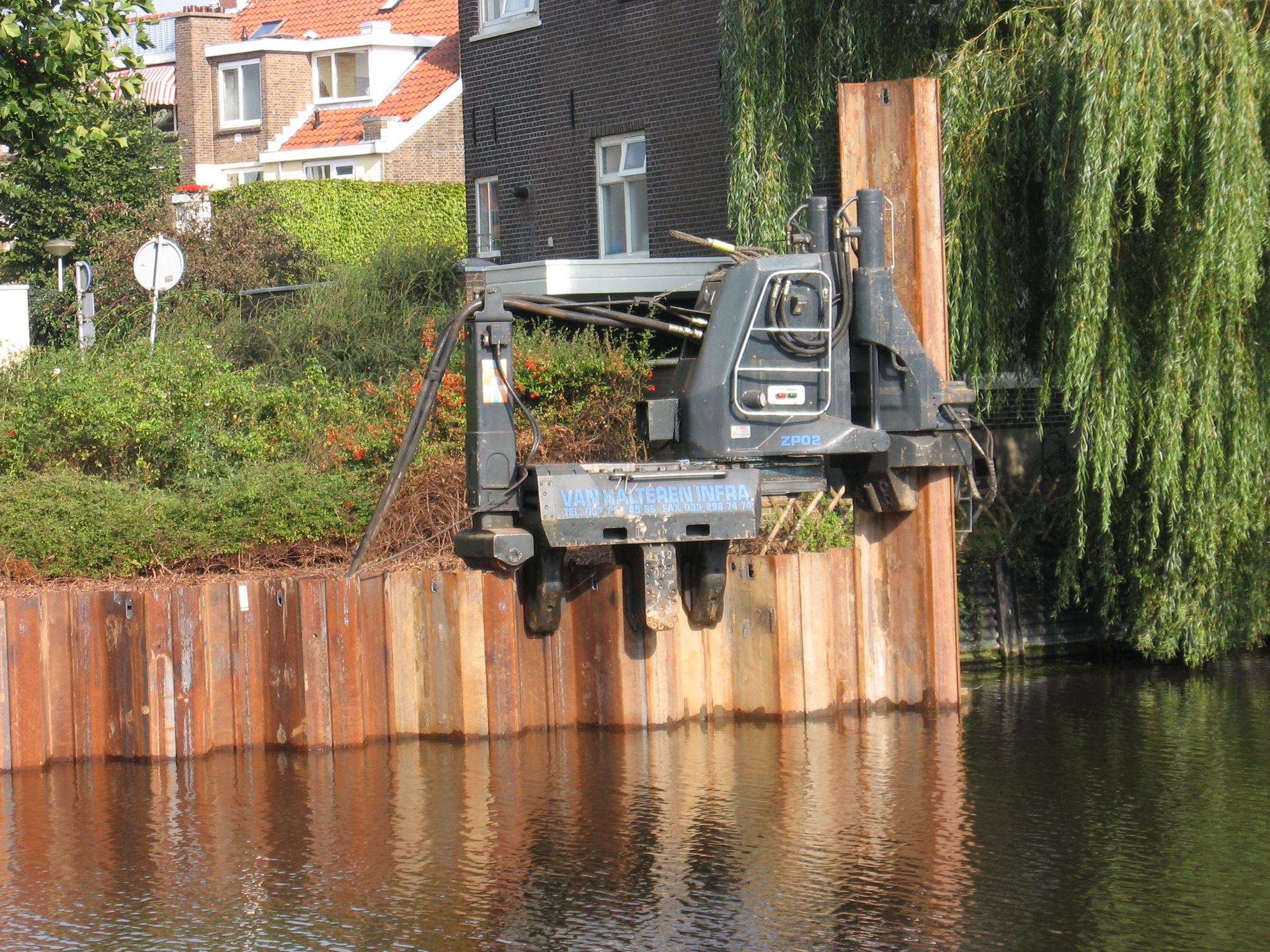 heimachine voor damwanden , bij de Haagse Vliet , Voorburg